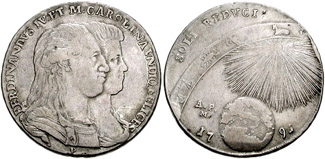 Italia, Regno di Napoli e Sicilia. Ferdinando IV di Borbone. Primo Regno, 1759-1799. AR Piastra. (40mm, 27.16 g). Datato 1791P. Busti congiunti di Ferdinando e Maria Carolina dx Terra e sole sotto un nastro con i segni zodiacali. Italy, Kingdom of Naples and Sicily. Ferdinand IV. First Reign, 1759-1799. AR Piastra. (40mm, 27.16 g). Dated 1791P. Conjoined busts of Ferdinand and Maria Carolina right Earth and Sun beneath zodiacal band. Davenport 1408; (KM) C.68.